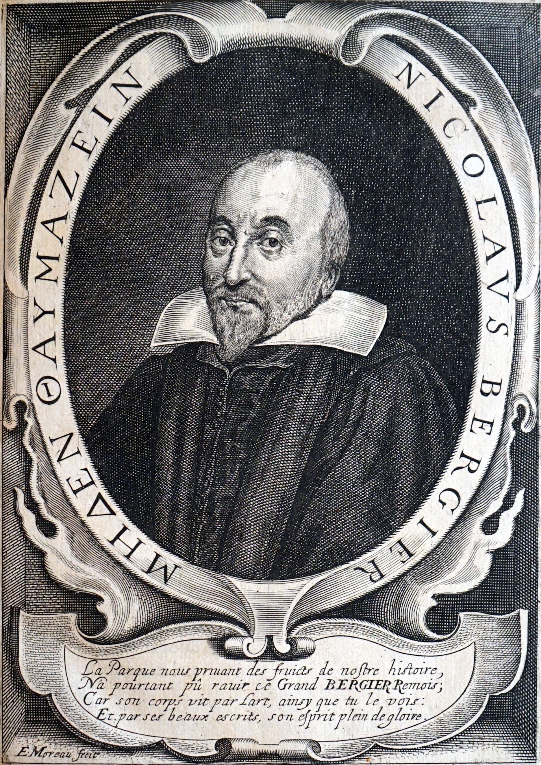 gravure représentant